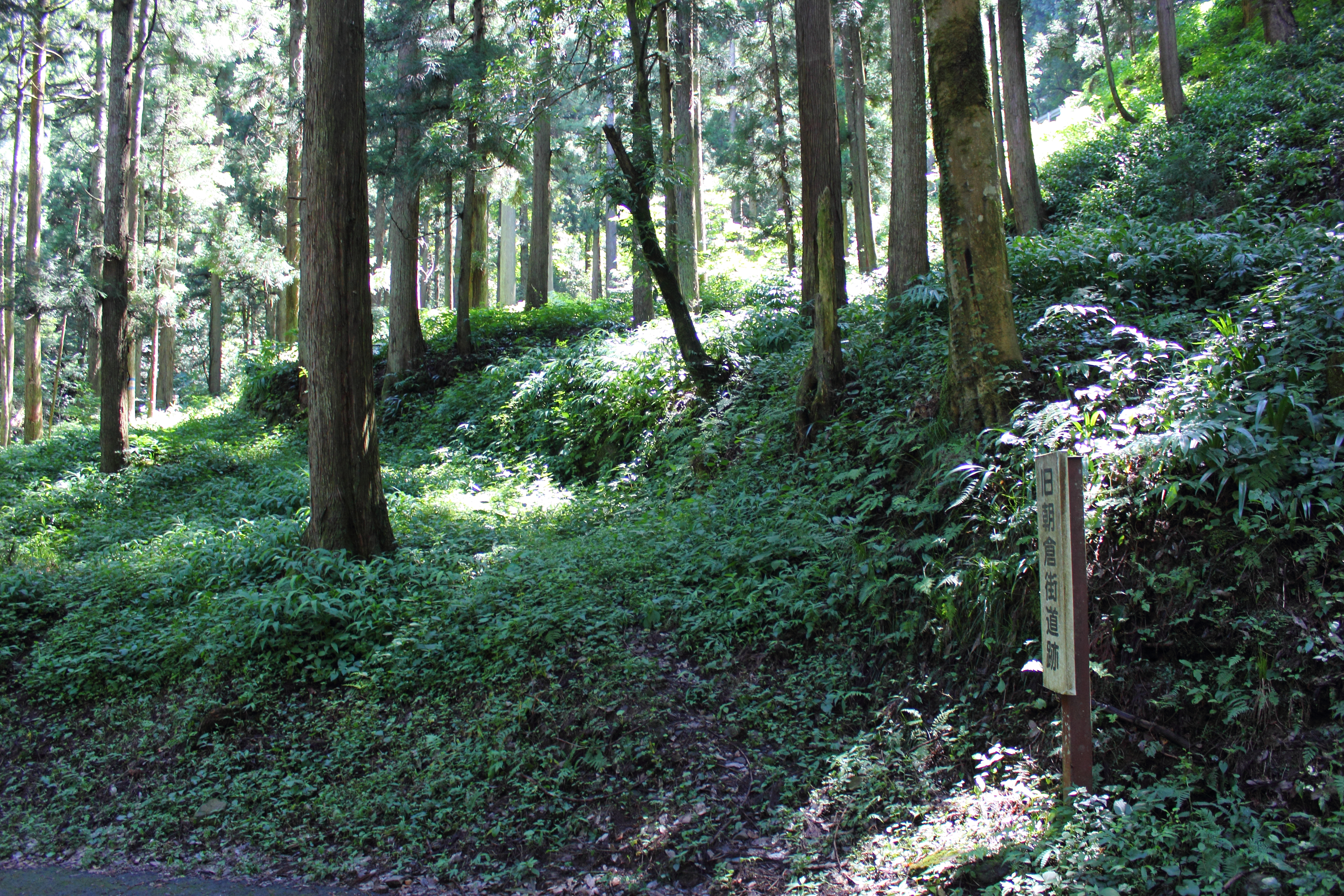 朝倉街道後